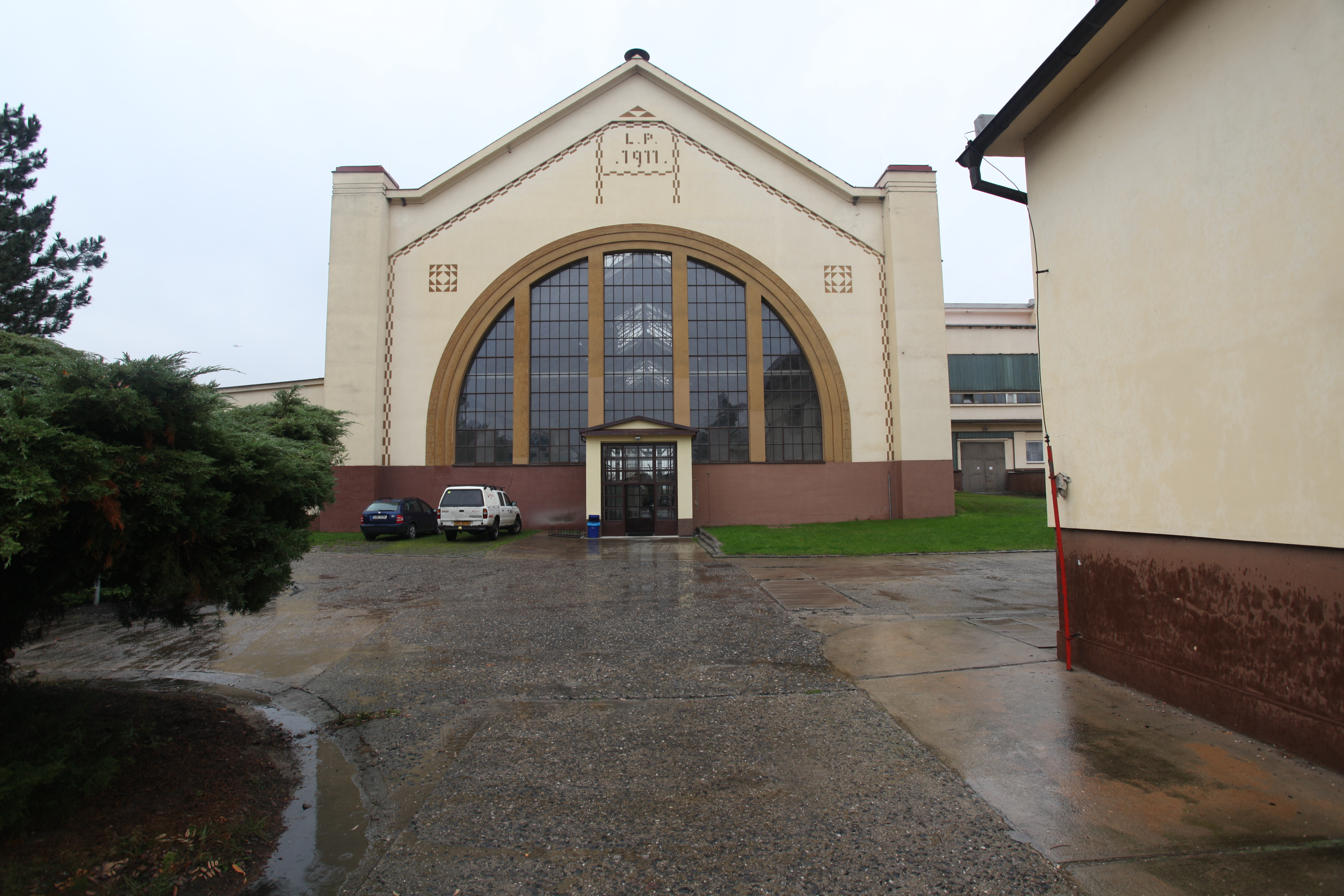 Fasáda hlavní čerpací stanice v úpravně vod Káraný. Budova byla navržena architektem Čeňkem Gregorem a vystavěna v letech 1908-1914. Obsahovala parní pístová čerpadla, která tlačila vodu I. Výtlačného řadem ve směru na Prahu. V současné době se zde nachází několik elektrických čerpadel a velín úpravny vod. Zdroje: Křivánek, Oldřich a Kněžek, Miroslav. 2001. Zdroje pitné vody v Káraném. Principy získávání vody v oblasti káranské vodárny. Pražské vodovody a kanalizace a.s.